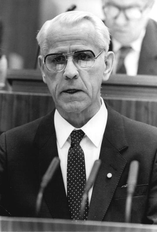 ADN-ZB/Mittelstädt 17.6.86- Berlin: Volkskammertagung Die Volkskammer der DDR trat zu ihrer 2. Tagung zusammen. Entsprechend der auf der 1. ( konstituierenden) Tagung der Obersten Volksvertretung beschlossenen Tagesordnung nahm zu Beginn Willi Stoph das Wort zur Erklärung des Vorsitzenden des Ministerrates der DDR.